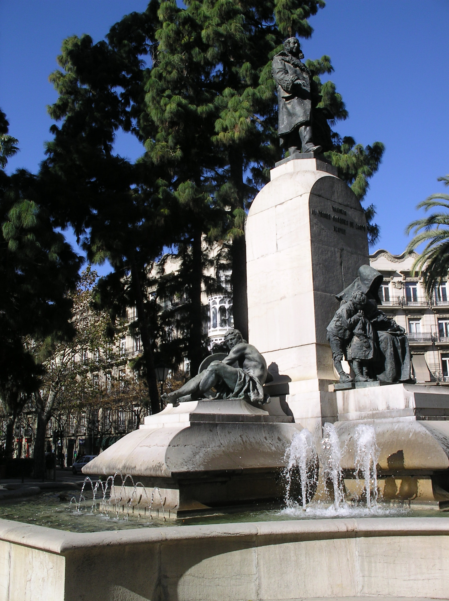 Vista de la Plaza de Canovas del Castillo, en Valencia, España